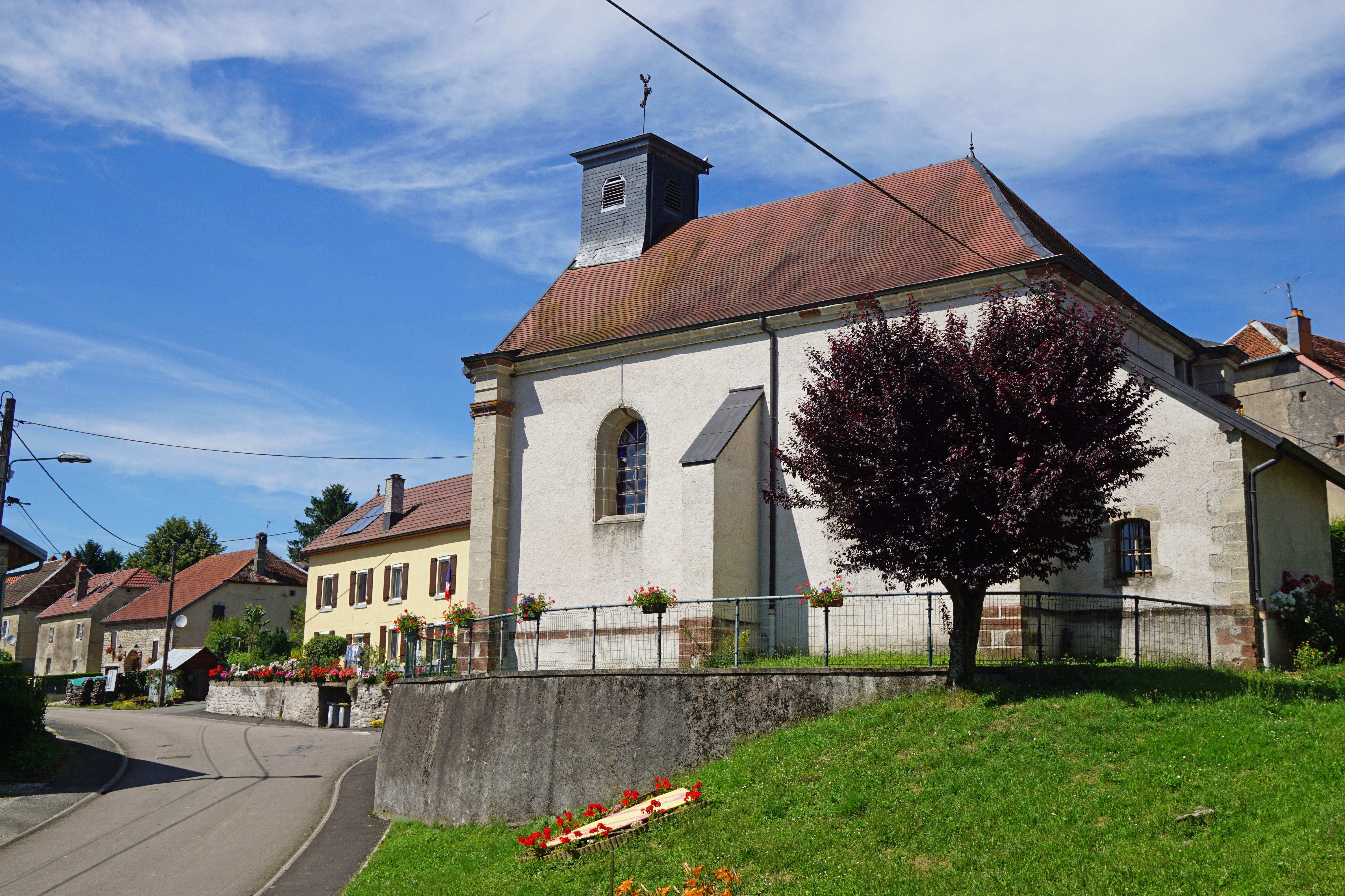 L#église Notre-Dame des Magny.